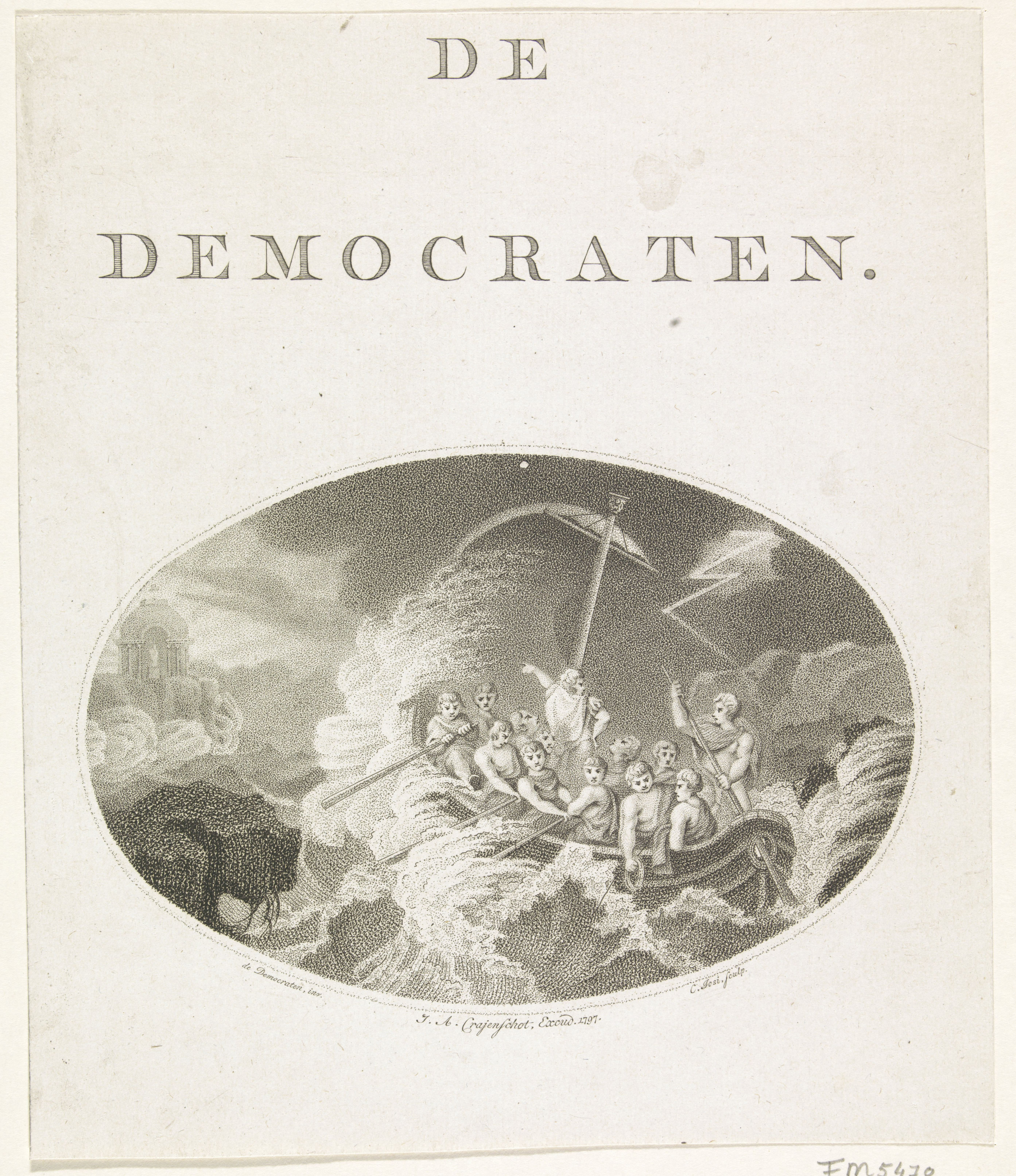 IdentificatieTitel(s): Titelvignet voor het tijdschrift: De Democraten, 1797De Democraten (titel op object)Objecttype: prent titelpagina Objectnummer: RP-P-OB-86.630Catalogusreferentie: FMH 5470Opschriften / Merken: verzamelaarsmerk, verso, gestempeld: Lugt 2228Omschrijving: Allegorisch titelvignet voor het tijdschrift: De Democraten, 1797. Groep mannen roeiend in een boot op zee tijdens een storm, in de verte hun bestemming: een tempel aan de kust.VervaardigingVervaardiger: prentmaker: Christiaan Josi (vermeld op object)uitgever: Jacobus Adrianus Crajenschot (vermeld op object)Plaats vervaardiging: NederlandDatering: 1797Fysieke kenmerken: stippeletsMateriaal: papier Techniek: stippeletsAfmetingen: blad: h 231 mm × b 195 mmToelichtingGebruikt als illustratie in het tijdschrift: De democraten. 3 dln. Amsterdam: J.A. Crajenschot, 1796-1798 (1797).OnderwerpWat: storm at seashipping accident; sickness and death at seaBataafse RepubliekWanneer: 1797 - 1797Verwerving en rechtenVerwerving: aankoop 1881Copyright: Publiek domein